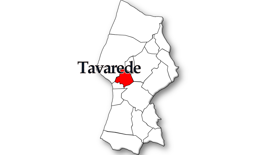 População